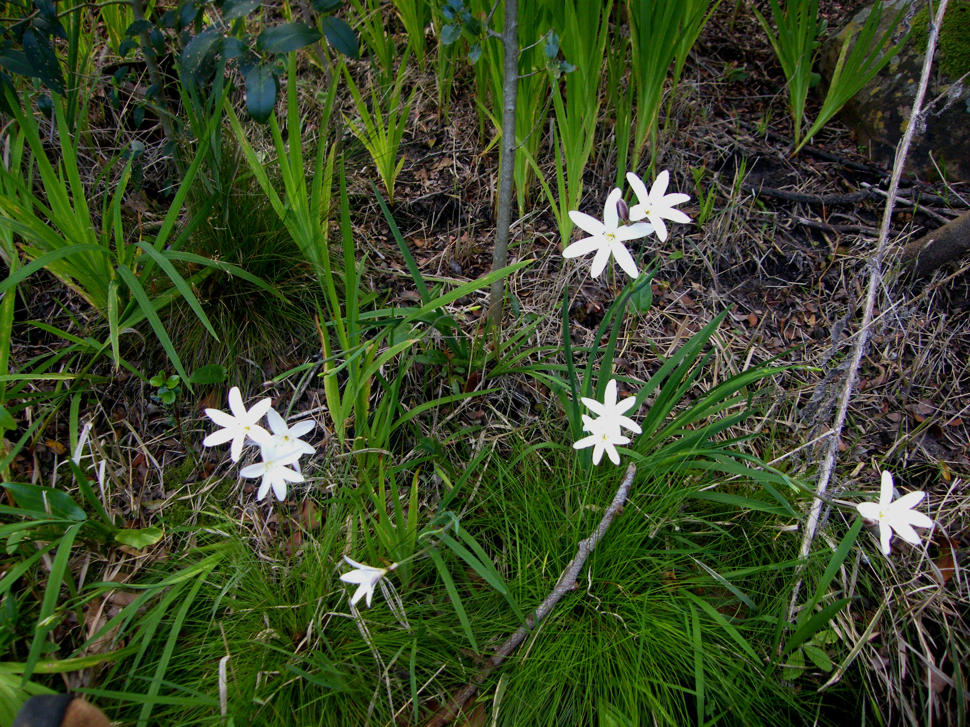 WitkalossieLatina: Sparaxis grandiflora subsp. fimbriata